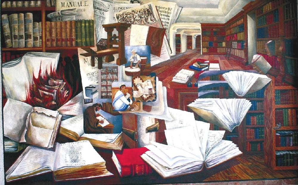 La Historia del Libro forma parte del conjunto mural Historia de la Humanidad, ubicado en el Centro de Información en Ciencias Sociales y Administrativas, de las facultades de Derecho, y Contaduría y Administración de la Universidad Autónoma de San Luis Potosí